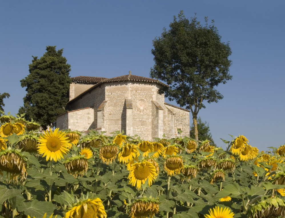 Tarn, Eglise Saint Jean le Froid de Mailhoc .